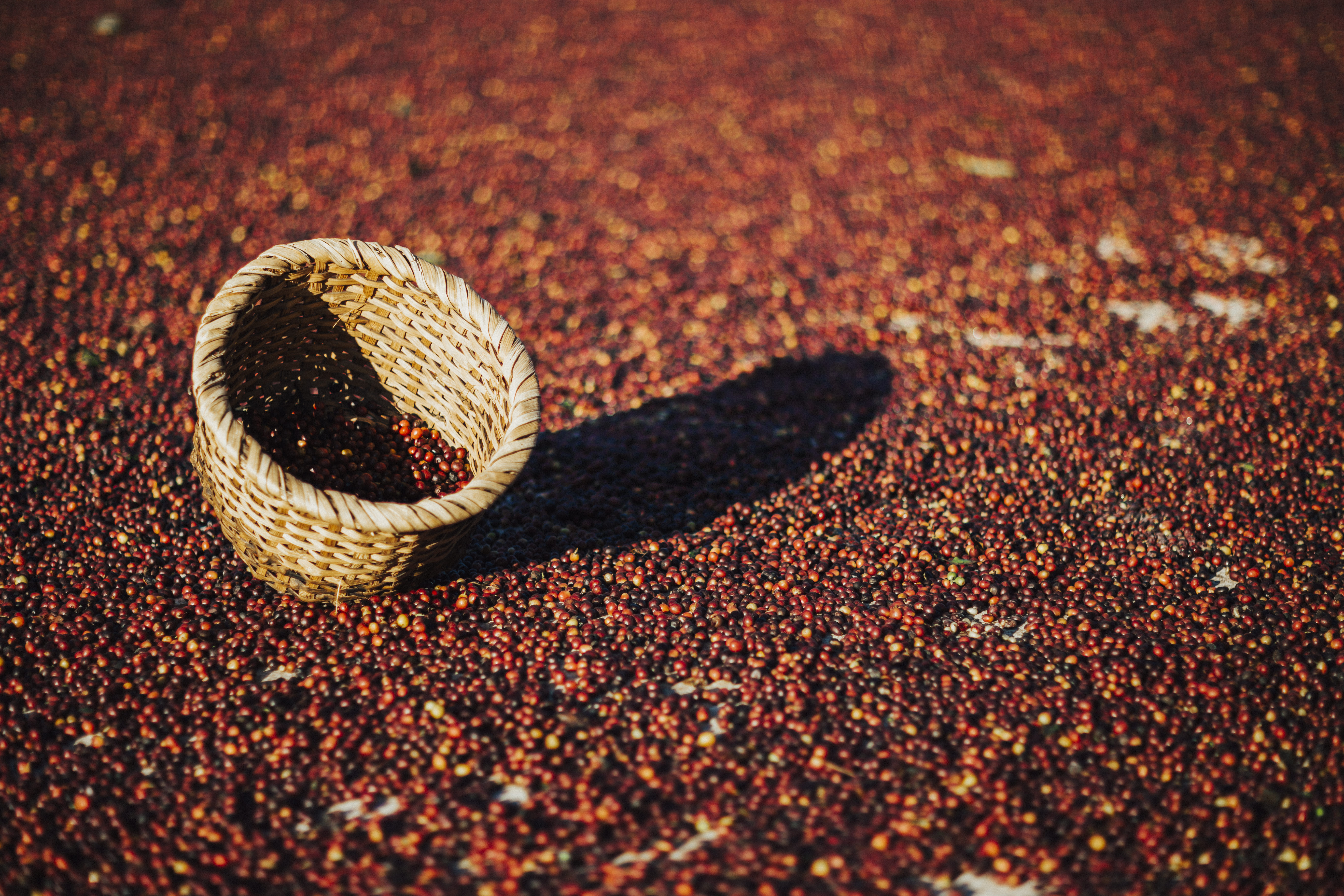 Canasta de café de Costa Rica recién recogido.